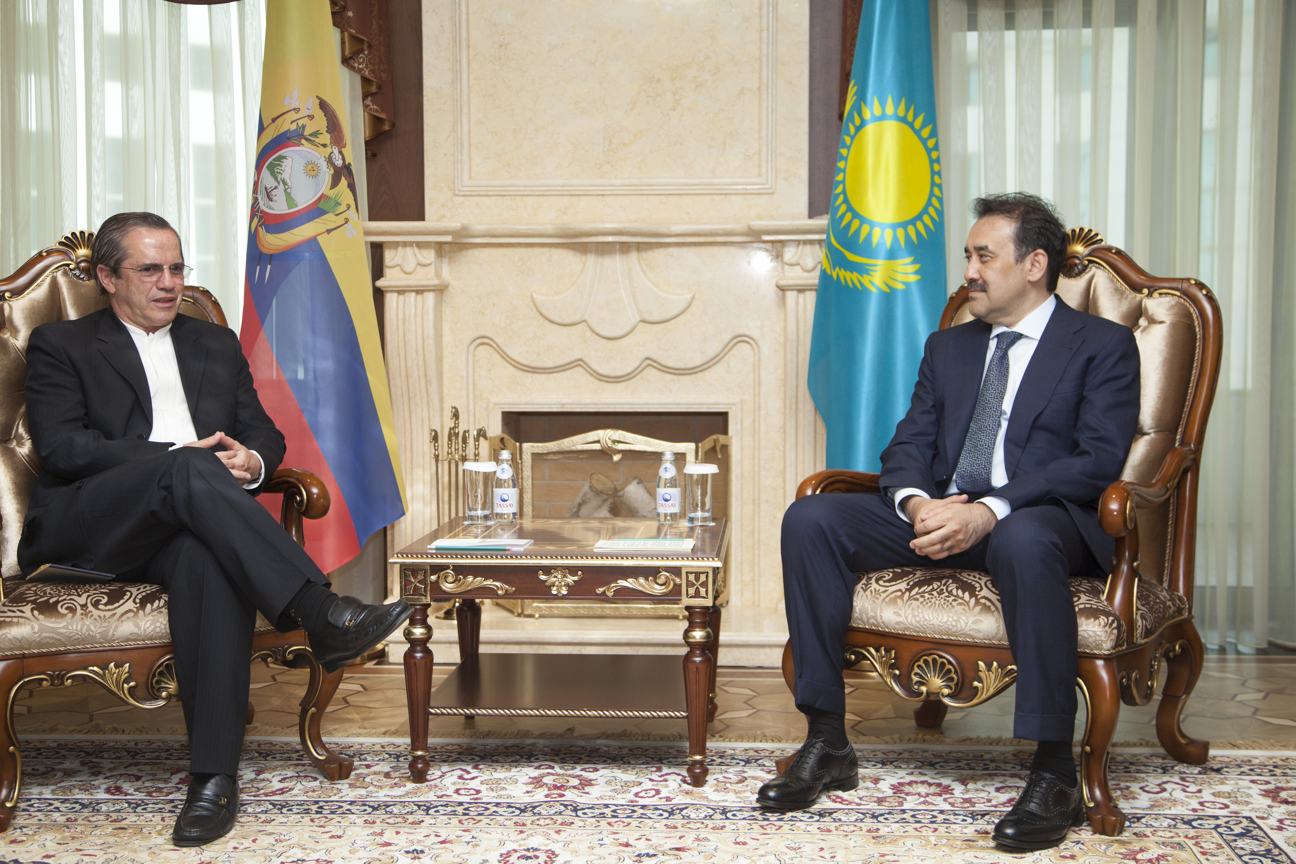 Astaná(Kazajstán), 04 jul 2014.- Canciller Ricardo Patiño mantuvo una reunión con el Primer Ministro de la República Kazajistán Karim Masimov Foto: David G Silvers - Cancillería Ecuador